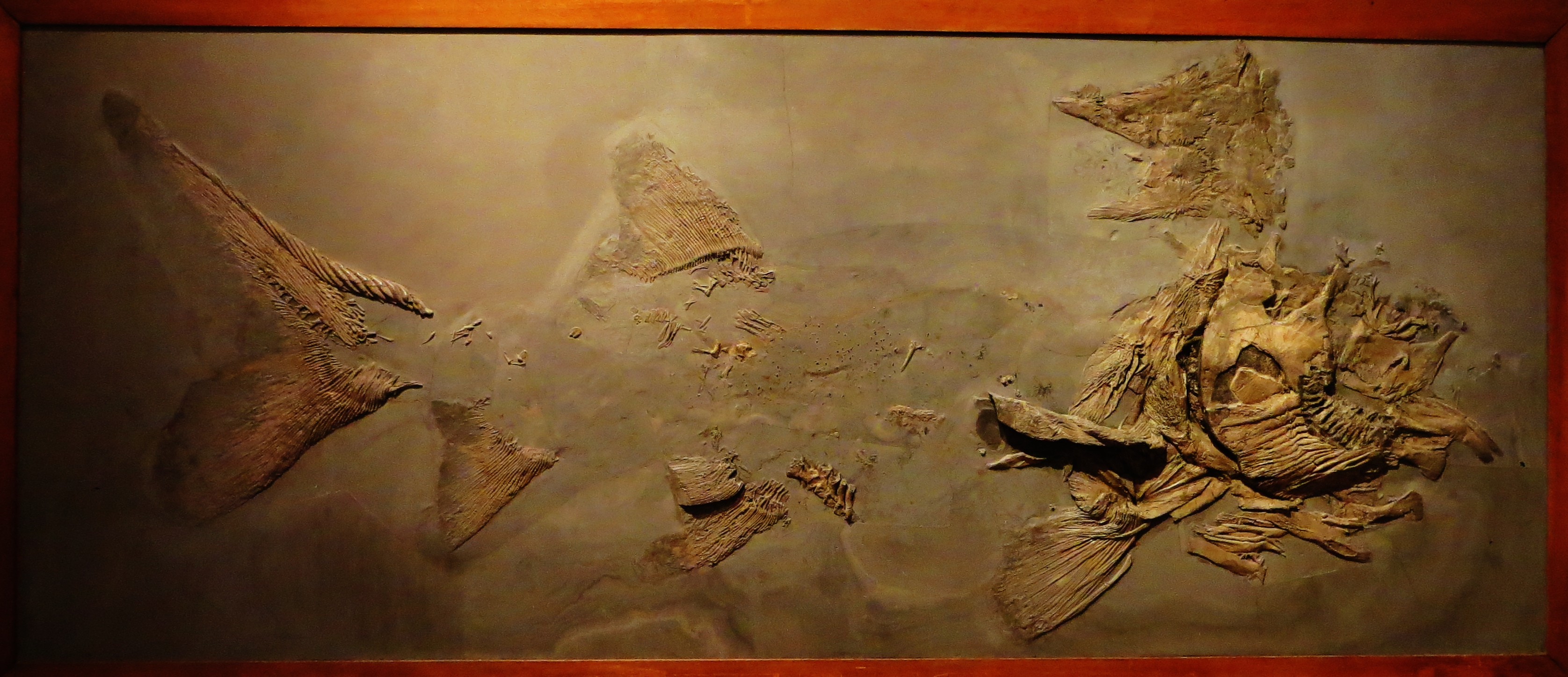 Fossil of Strongylosteus, an extinct fish- Took the picture at Museum of Paleontology, Tubingen